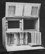 Kuntzschbeute / "Kuntzsch-Zwilling"